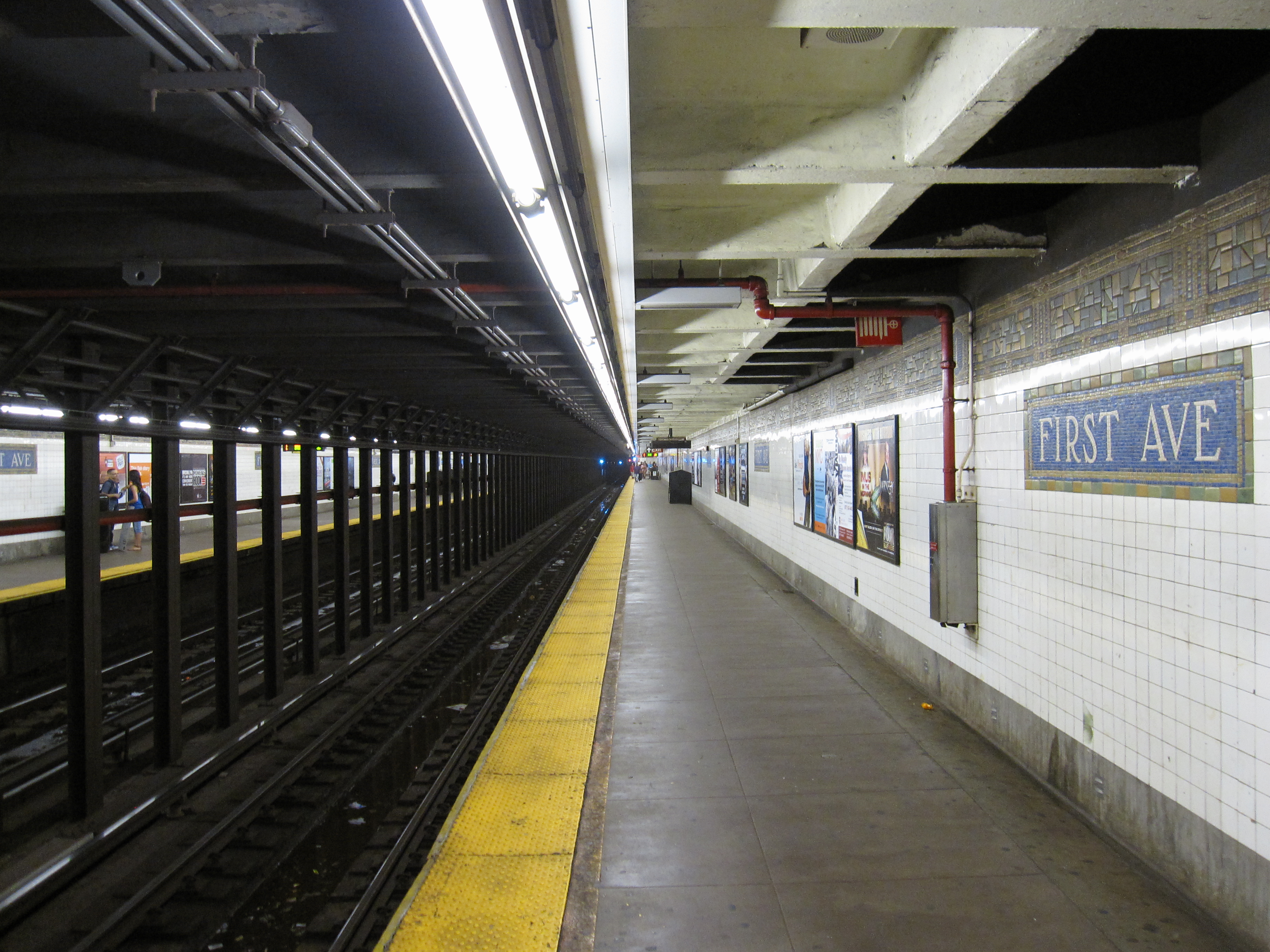 First Avenue (BMT Canarsie Line)